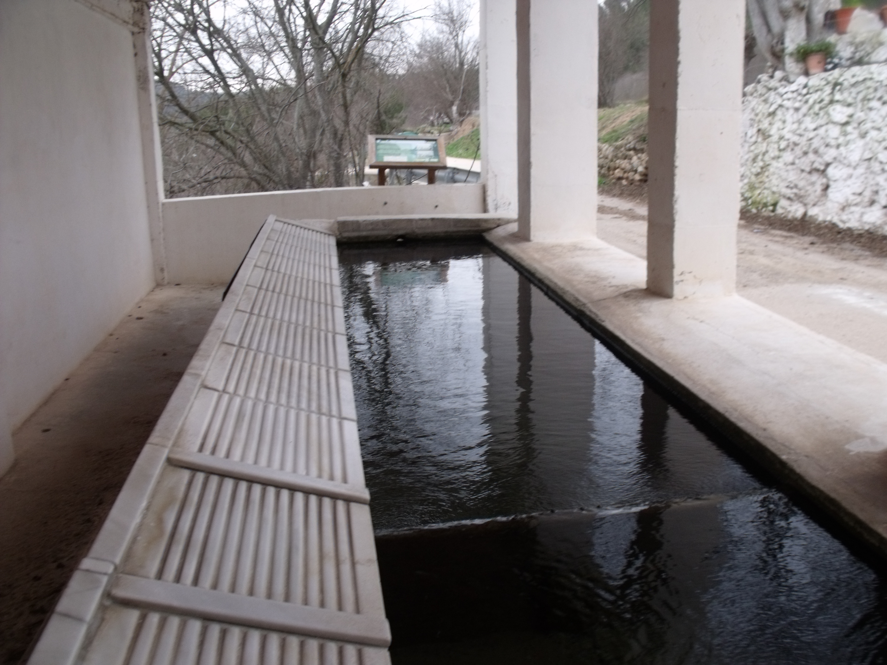 Lavadero